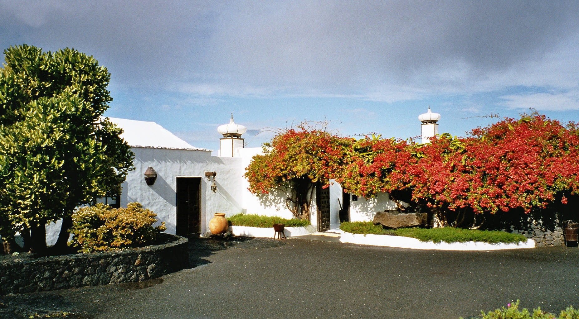 Fundación César Manrique, Near Tahiche, Lanzarote, Outer View